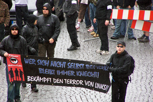 "Automome Nationalisten" aus Südthüringen